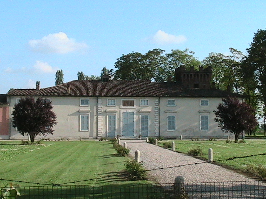 Rivarolo del Re - La Todeschina